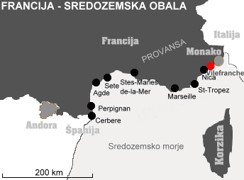 Skica lokacije Villefranche